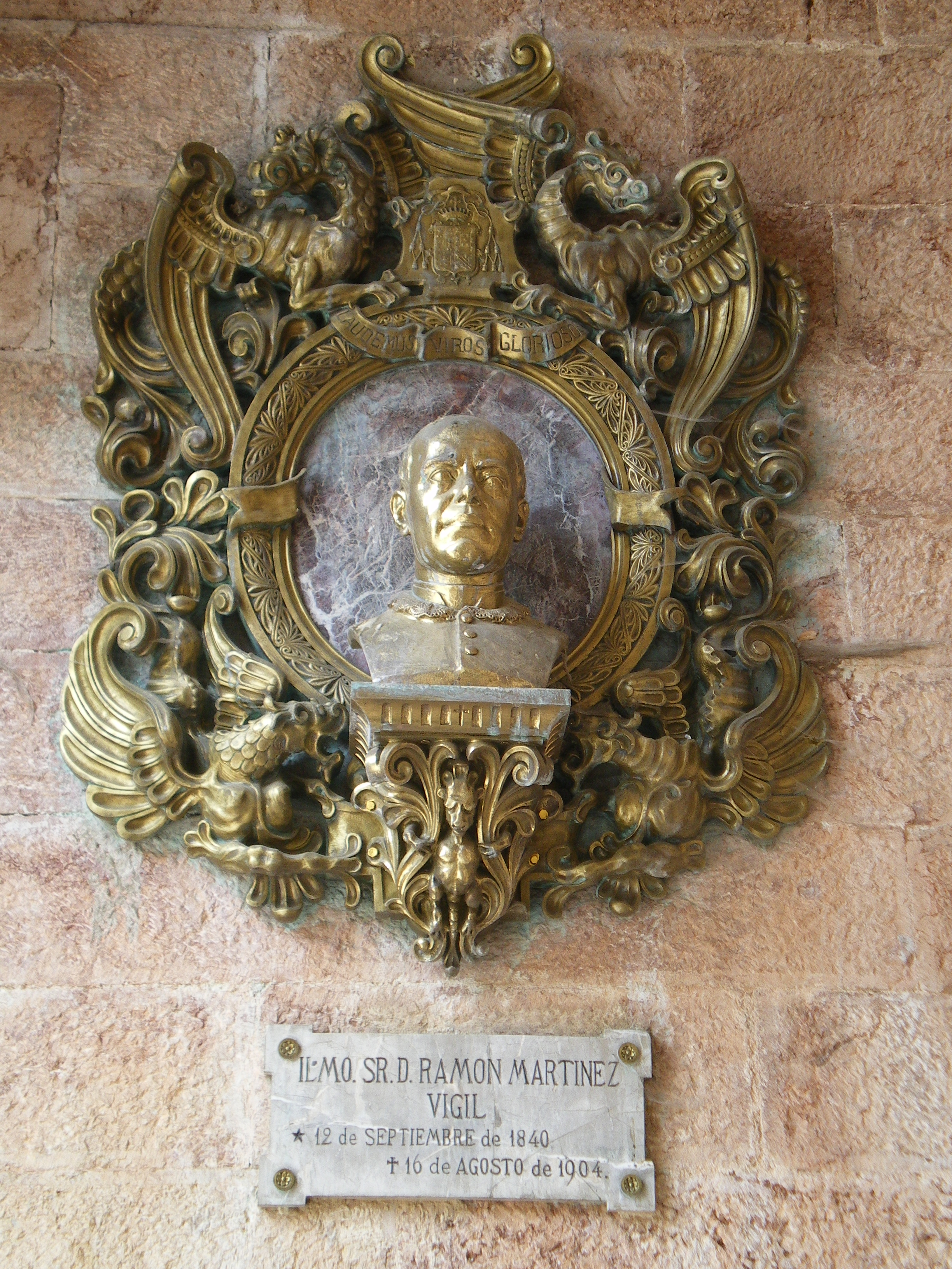 Busto de Ramón Martínez Vigil en la entrada de la basílica de Covadonga, realizado por Félix Granda y Buylla